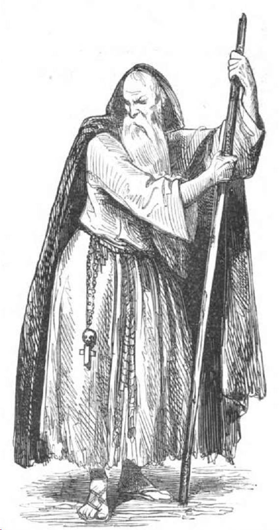 Ligier in der Rolle des Friedrich Barbarossa, als Bettler.